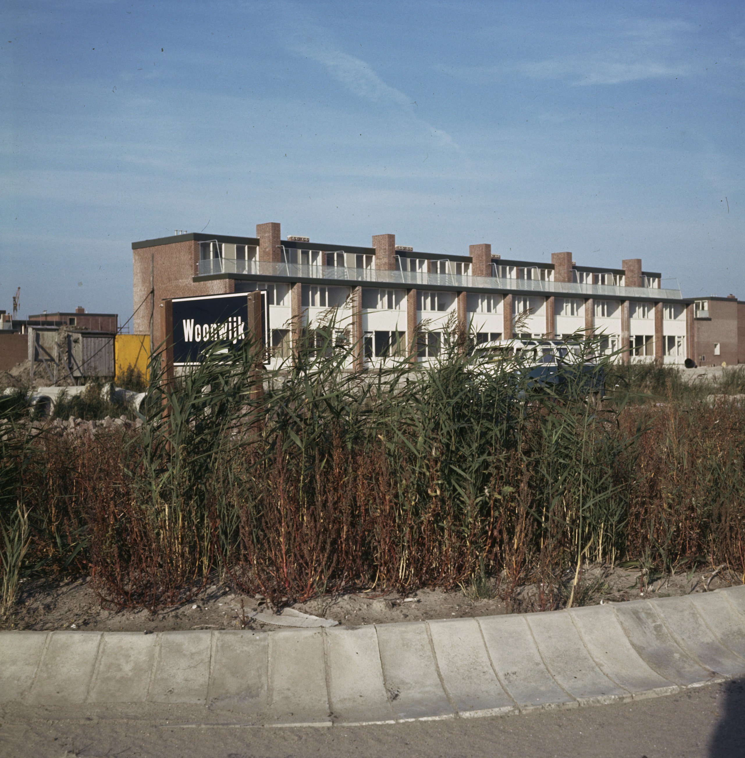 Collectie / Archief : Fotocollectie Anefo Reportage / Serie : [ onbekend ] Beschrijving : Lelystad ( Oost Flevopolder ); woningen Datum : 28 september 1967 Locatie : Flevoland, Lelystad Trefwoorden : WONINGEN Fotograaf : Koch, Eric / Anefo Auteursrechthebbende : Nationaal Archief Materiaalsoort : Dia (kleur) Nummer archiefinventaris : bekijk toegang 2.24.01.07 Bestanddeelnummer : 254-7923